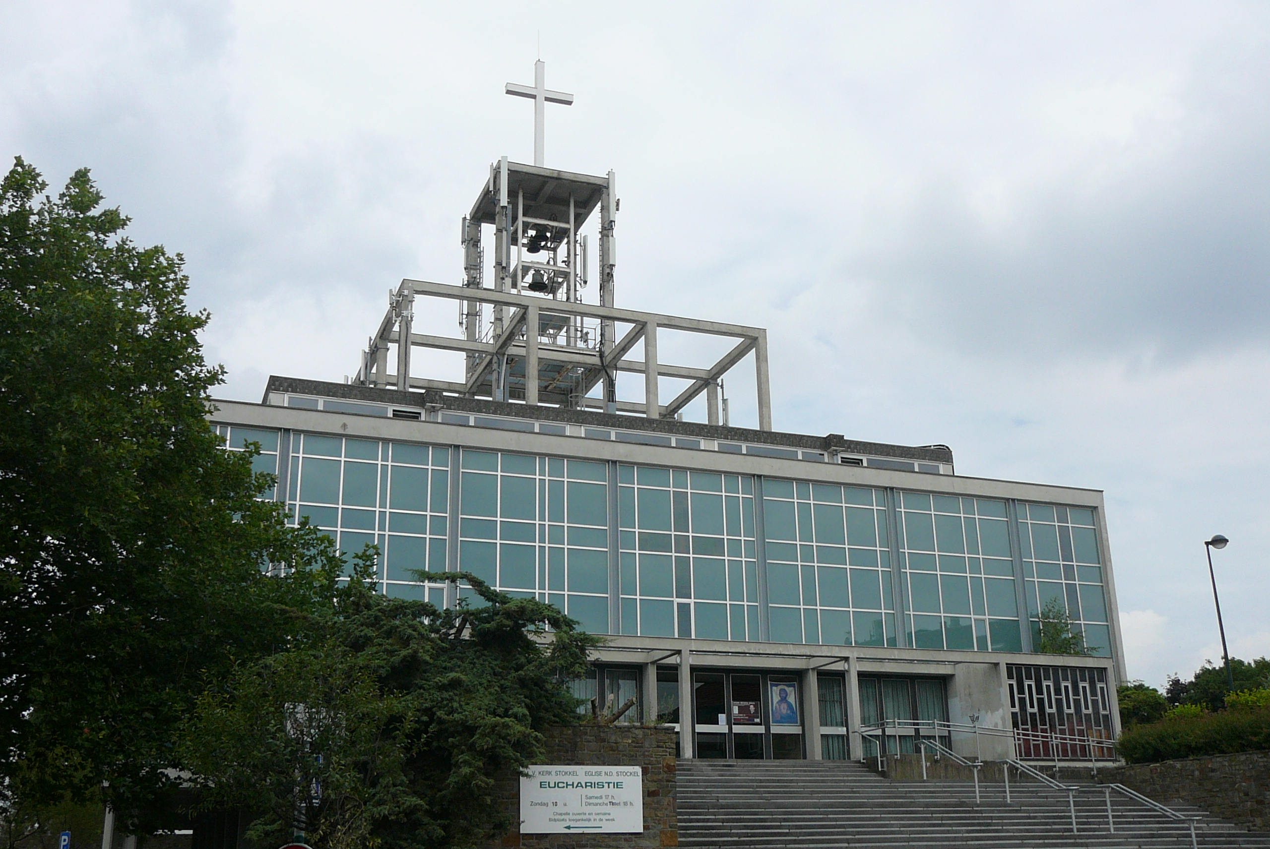 Église Notre-Dame de Stockel de Aerts et Ramon (1962), à Woluwe-Saint-Pierre, en Région de Bruxelles-Capitale, Belgique